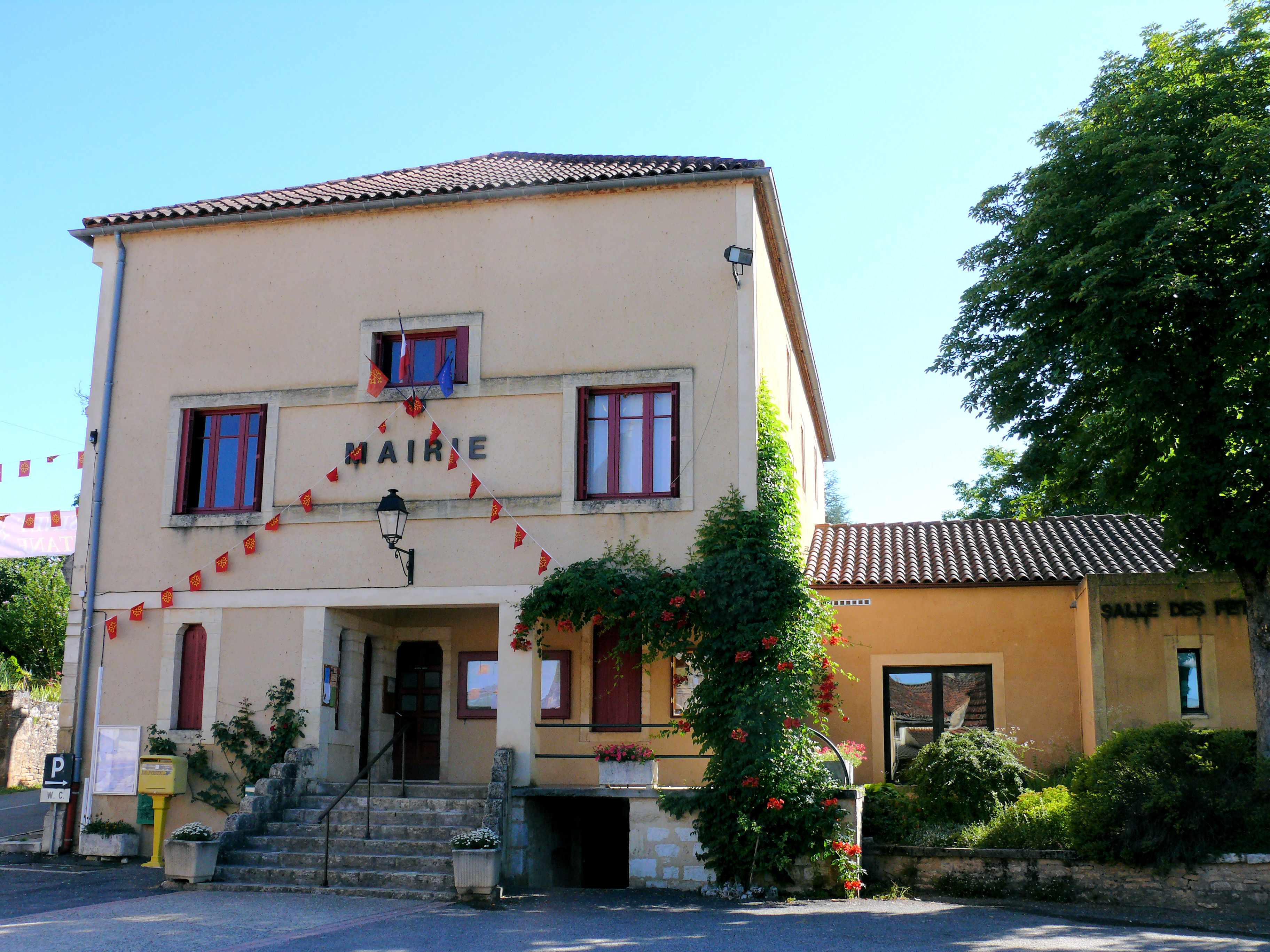 Frayssinet-le-Gelat - Mairie